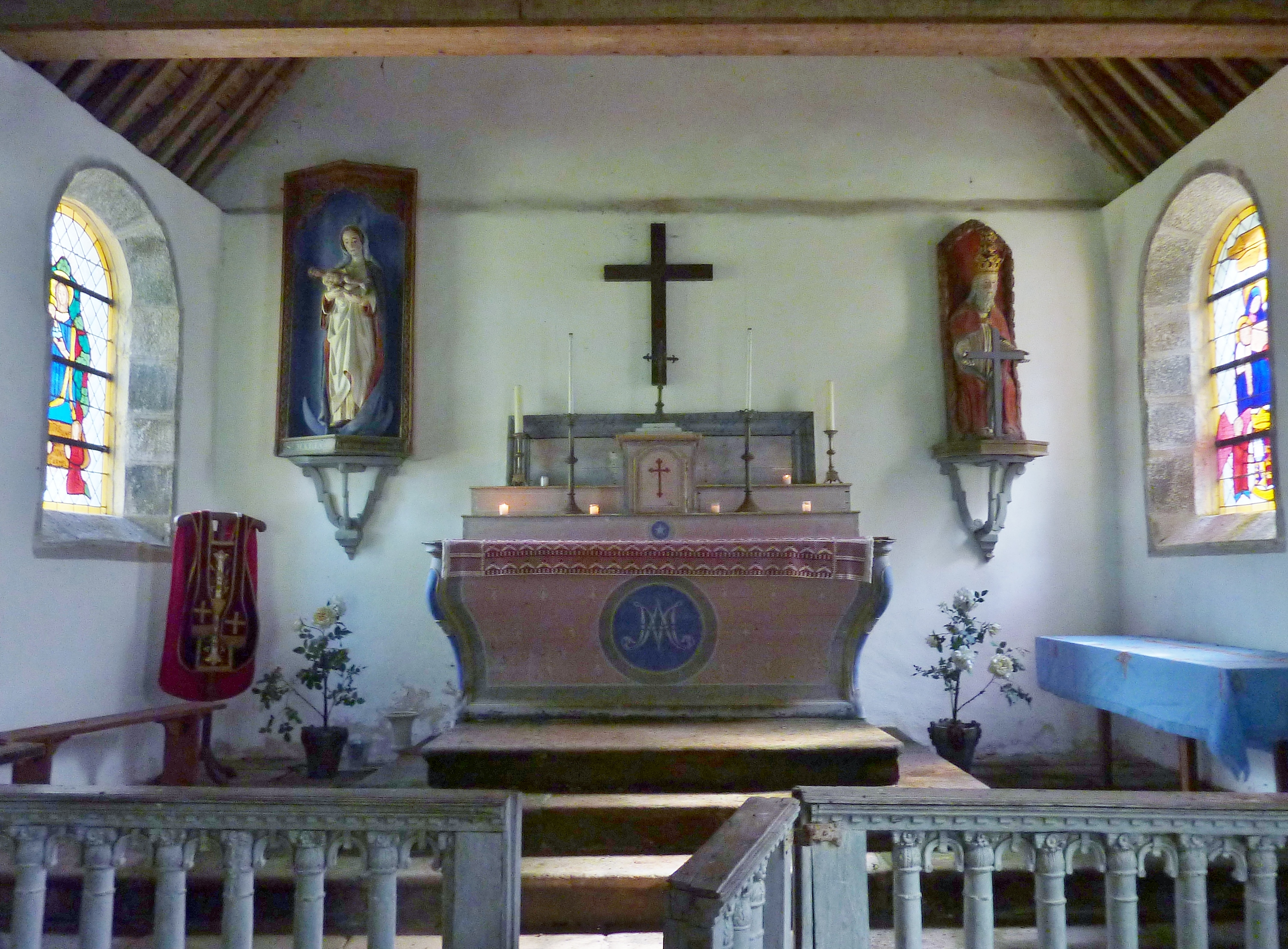 Château de Maillé (Plounévez-Lochrist) : la chapelle actuelle, vue intérieure (la chapelle actuelle est une ancienne grange dans laquelle l'intérieur de l'ancienne chapelle détruite en 1805 a été transféré)